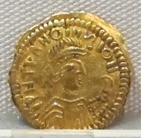 Palazzo Massimo alle Terme